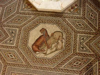 Römische Ausgrabungen im Saarland: Das Mosaik in Nennig